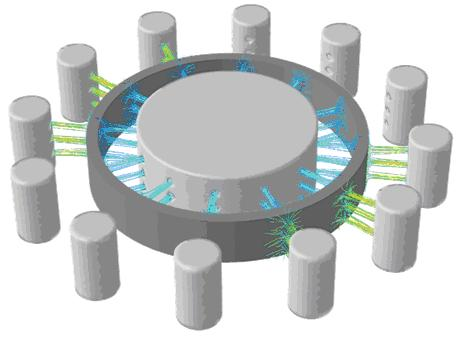 Schematische Darstellung einer asymmetrischen Abschreckung